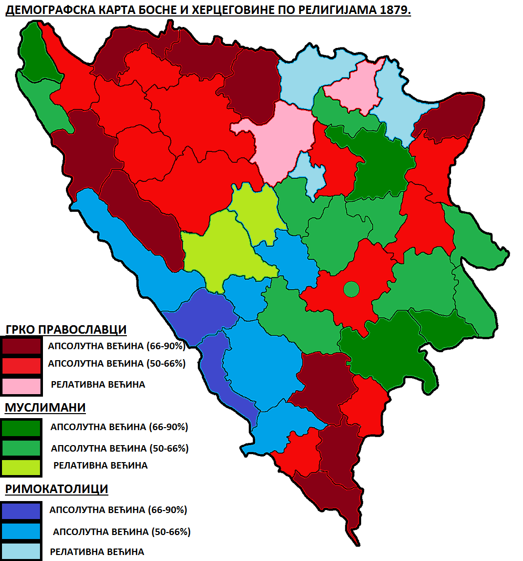 Вјерска мапа Босне и Херцеговине 1879. године